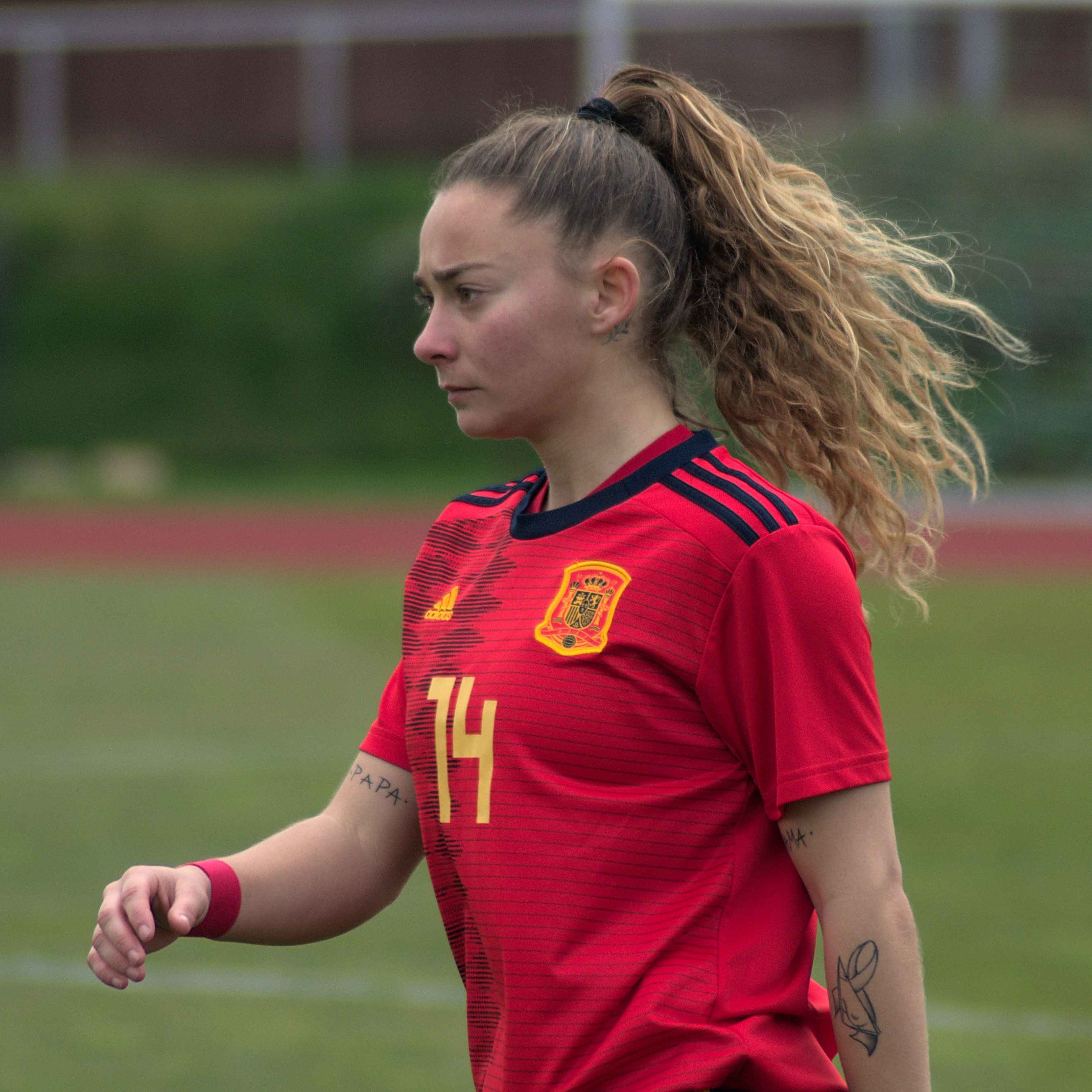 Ainhoa Marín Martín, en un partido amistoso con la selección española en enero de 2020.